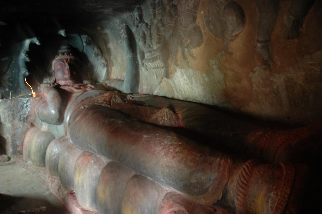 Manne Praveen